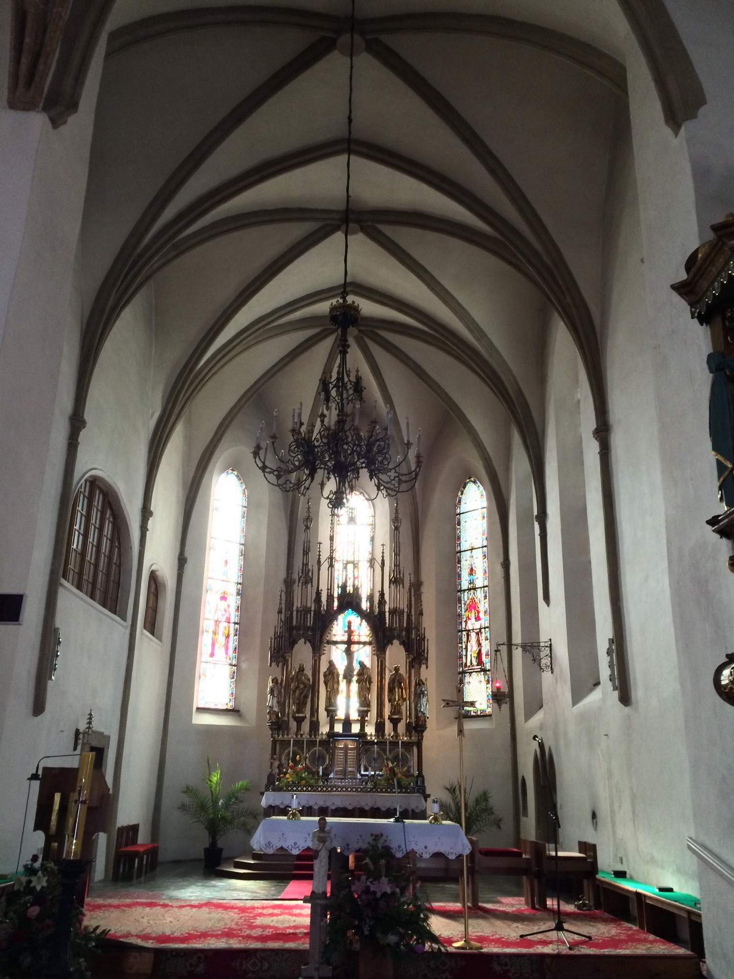 Pohled do presbytáře s hlavním oltářem. Je jedenáct metrů vysoký, byl zhotoven v pseudogotickém slohu žamberským řezbářem Petrem Musilem roku 1895.